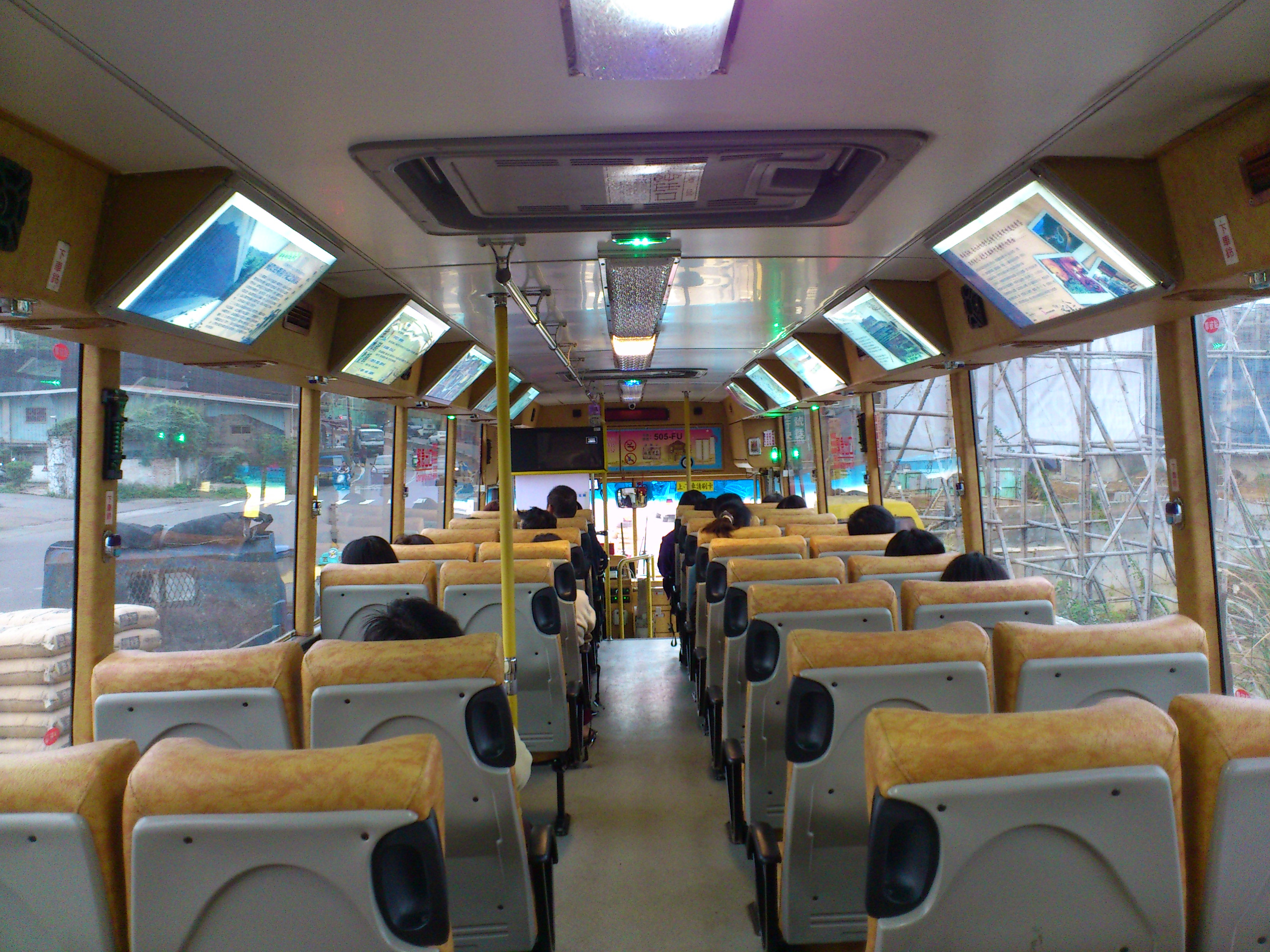 基隆客運的日野RK8JRSA「驚豔水金九」光雕公車505-FU內裝